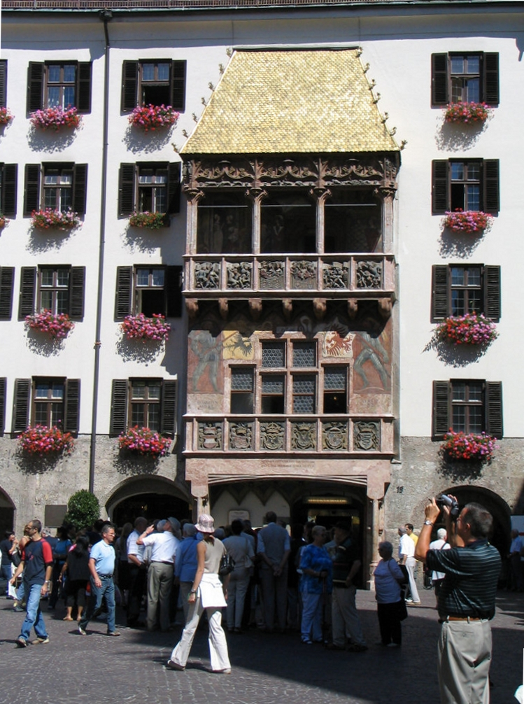 Goldenes Dachl Innsbruck Austria